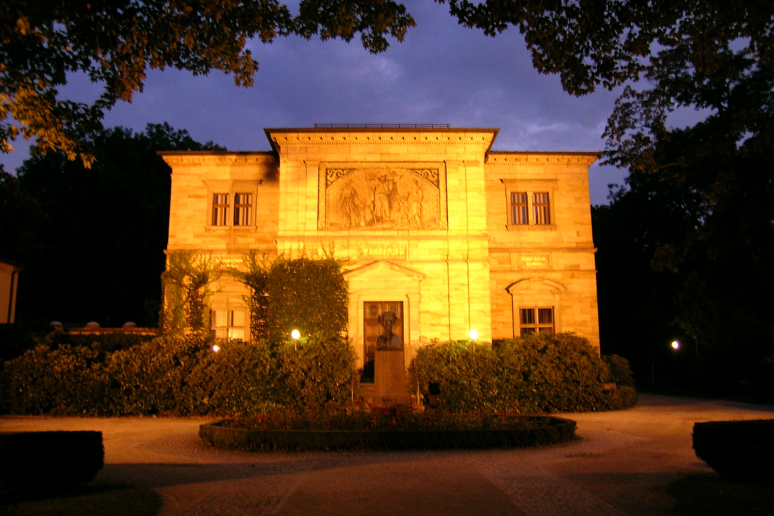 Wahnfried am Abend